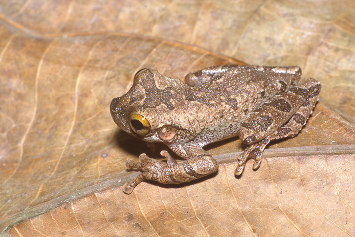 Osteocephalus buckleyi